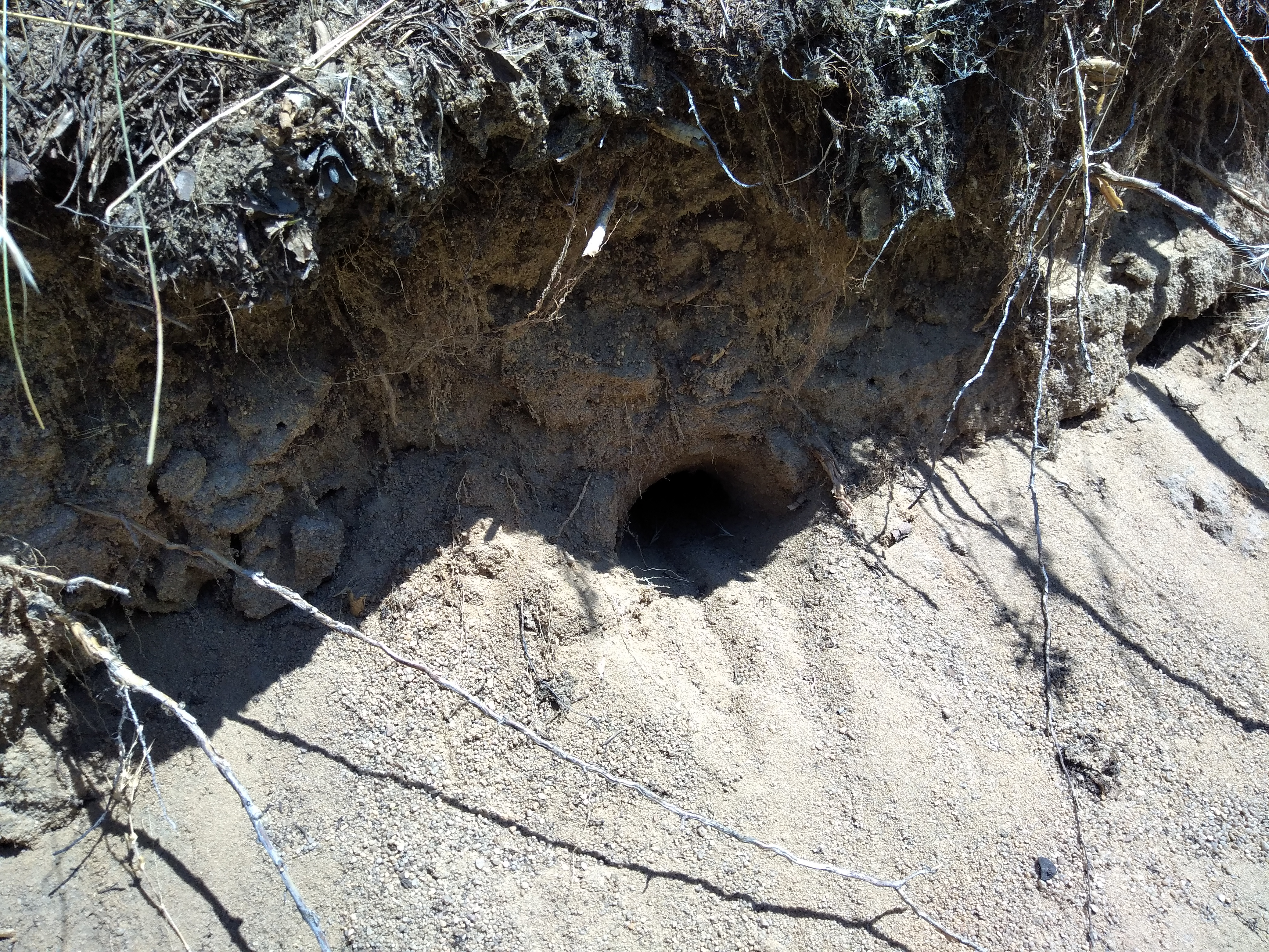 Баловно-Матвіївське урочище. Знято смартфоном.